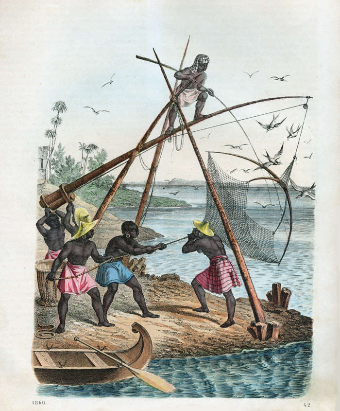 In: Das Buch der Welt, Stuttgart, 1842-48